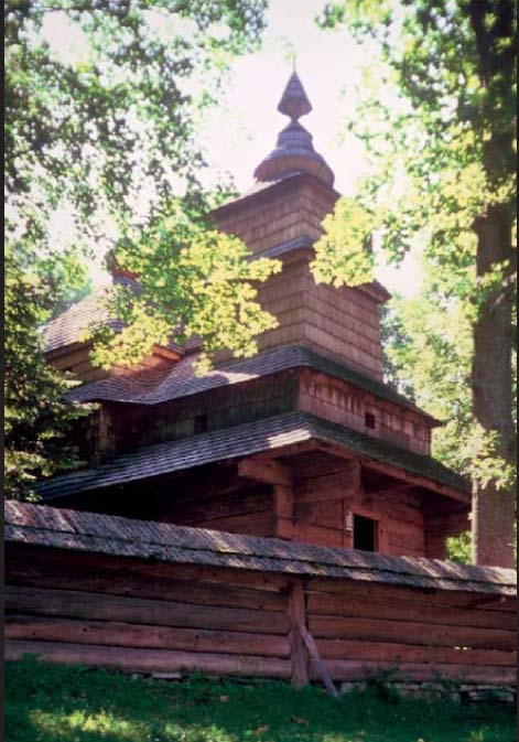 Drvena crkva Rusina iz muzeja na otvorenom